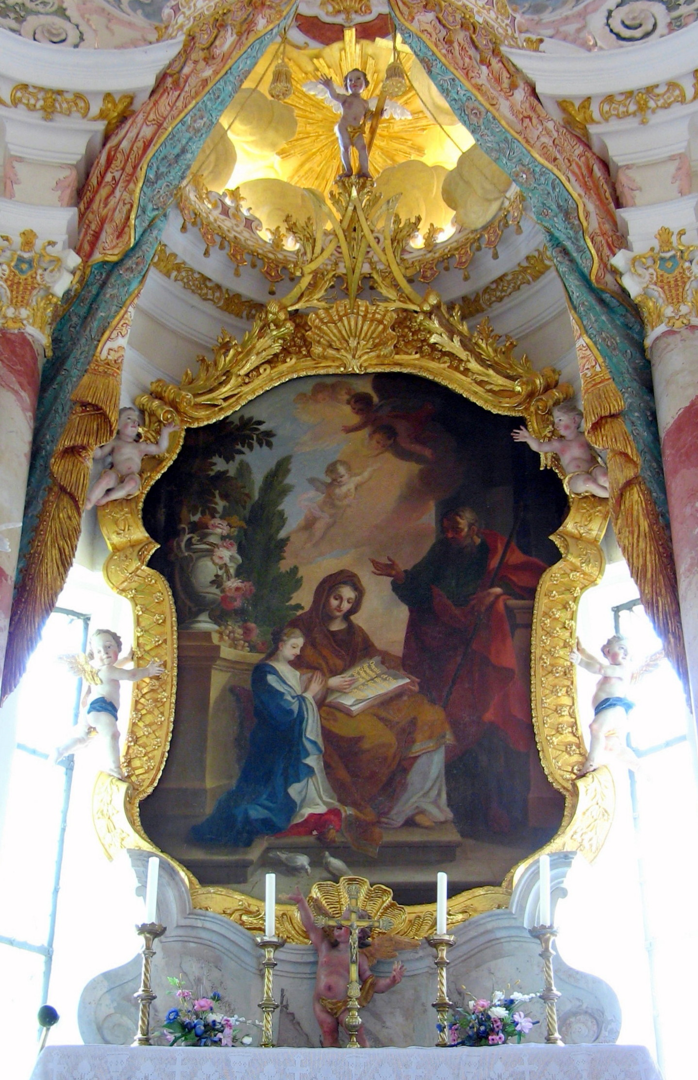 Altar von Anton Sturm in der Annakapelle in Buxheim